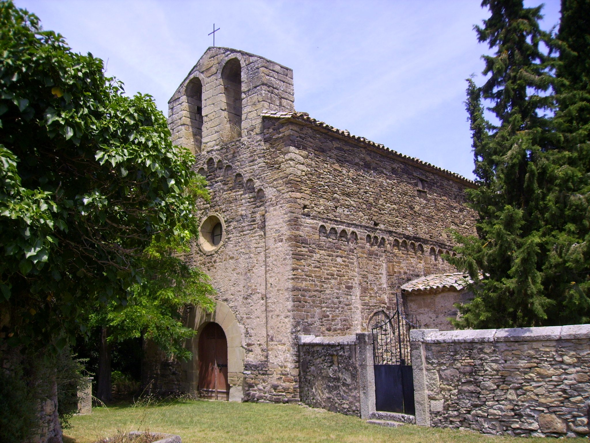 Església de Sant Pere de Savassona (Tavèrnoles)